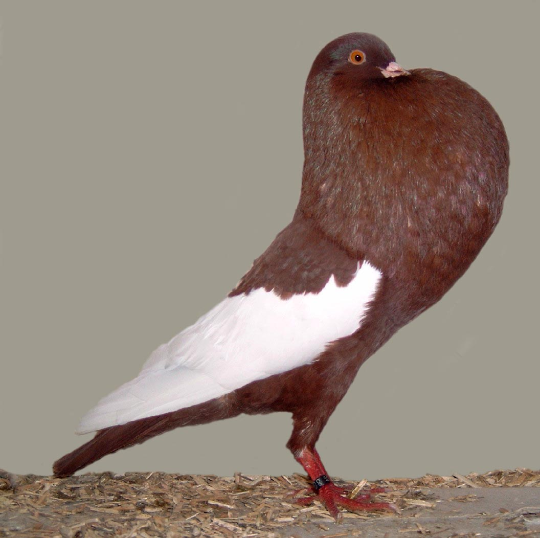 Schalaster Pouter (Red)